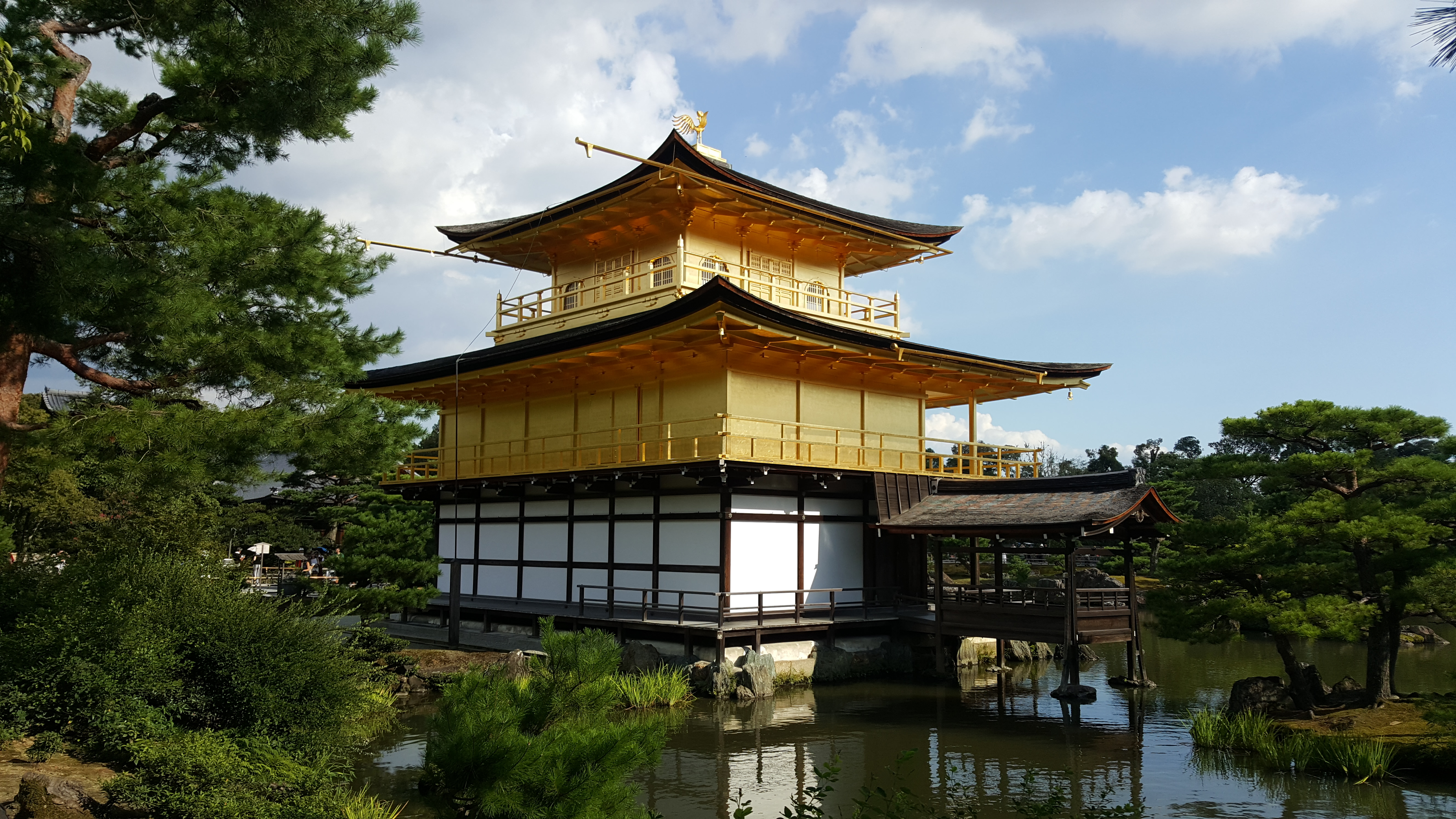 Chrám Kinkakudži (Zlatý pavilon) v Kjótu